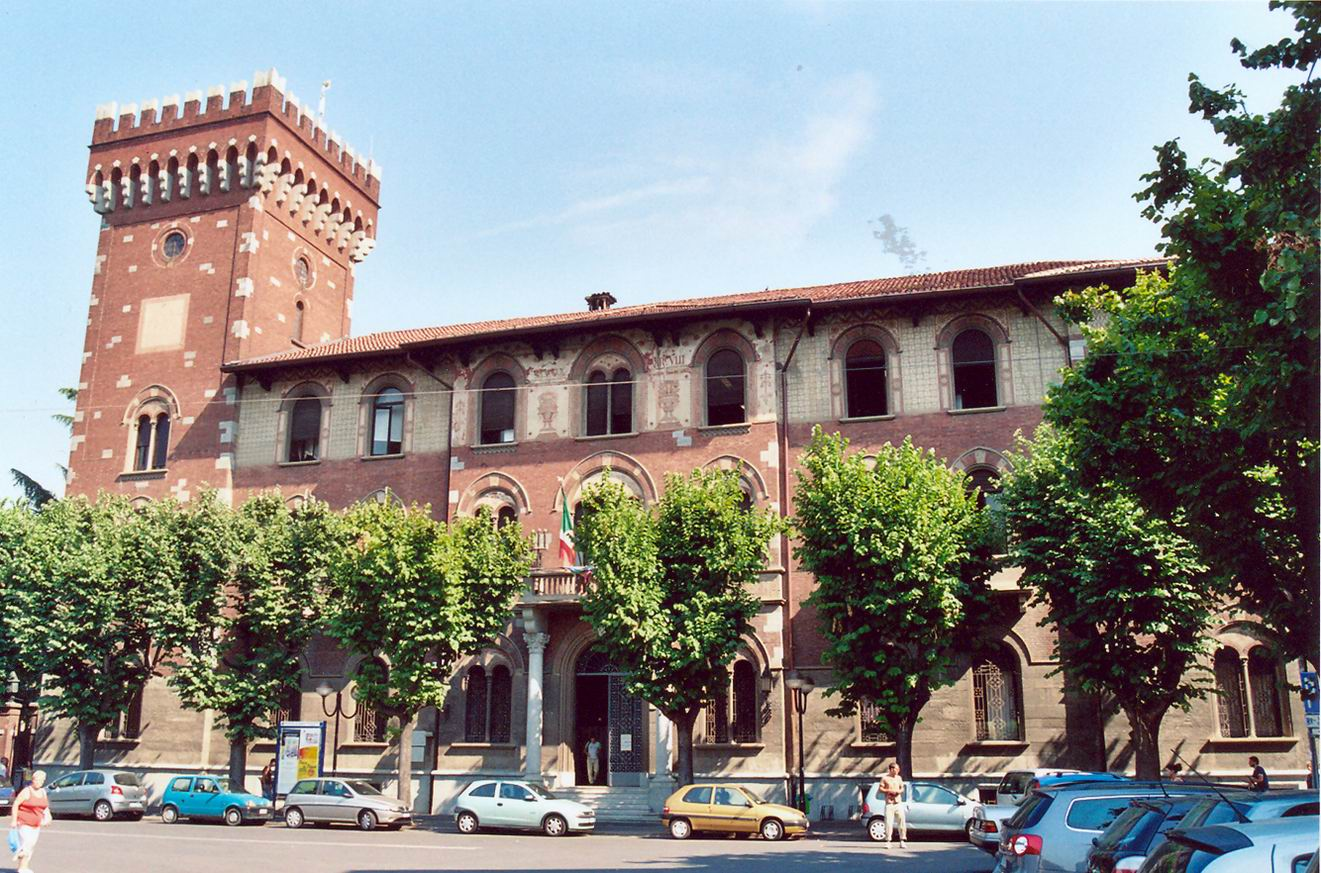 Rho, Il Municipio